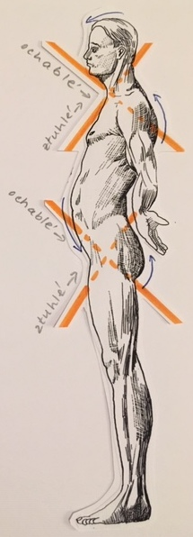 Horní a dolní zkřížený syndrom podle prof. Vladimíra Jandy (ochablé x ztuhlé svaly)